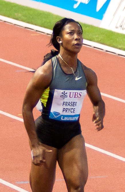 Athletissima 2012 - 100m F